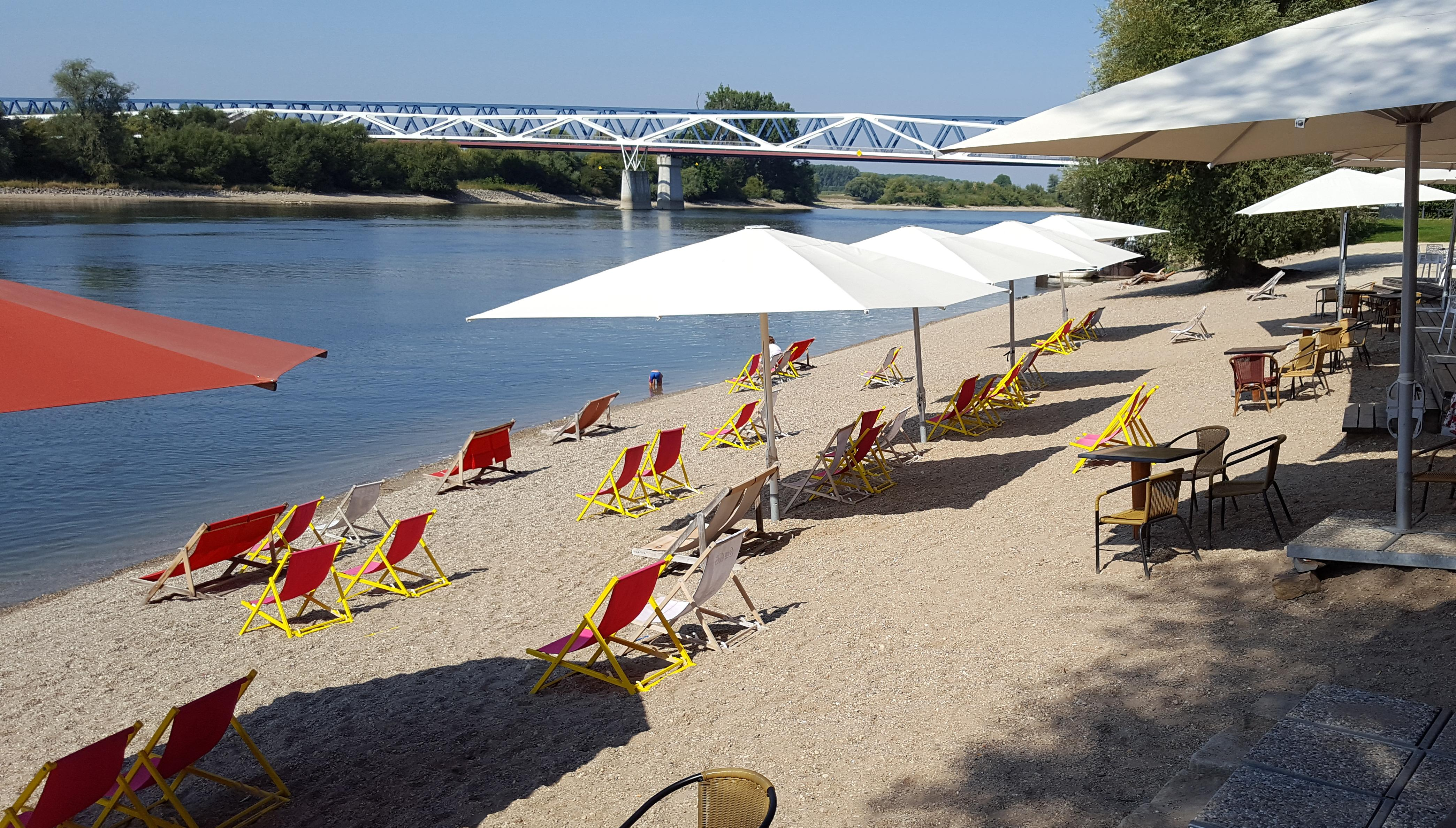 Deggendorfer Donaupromenade mit Stadtstrandabschnitt